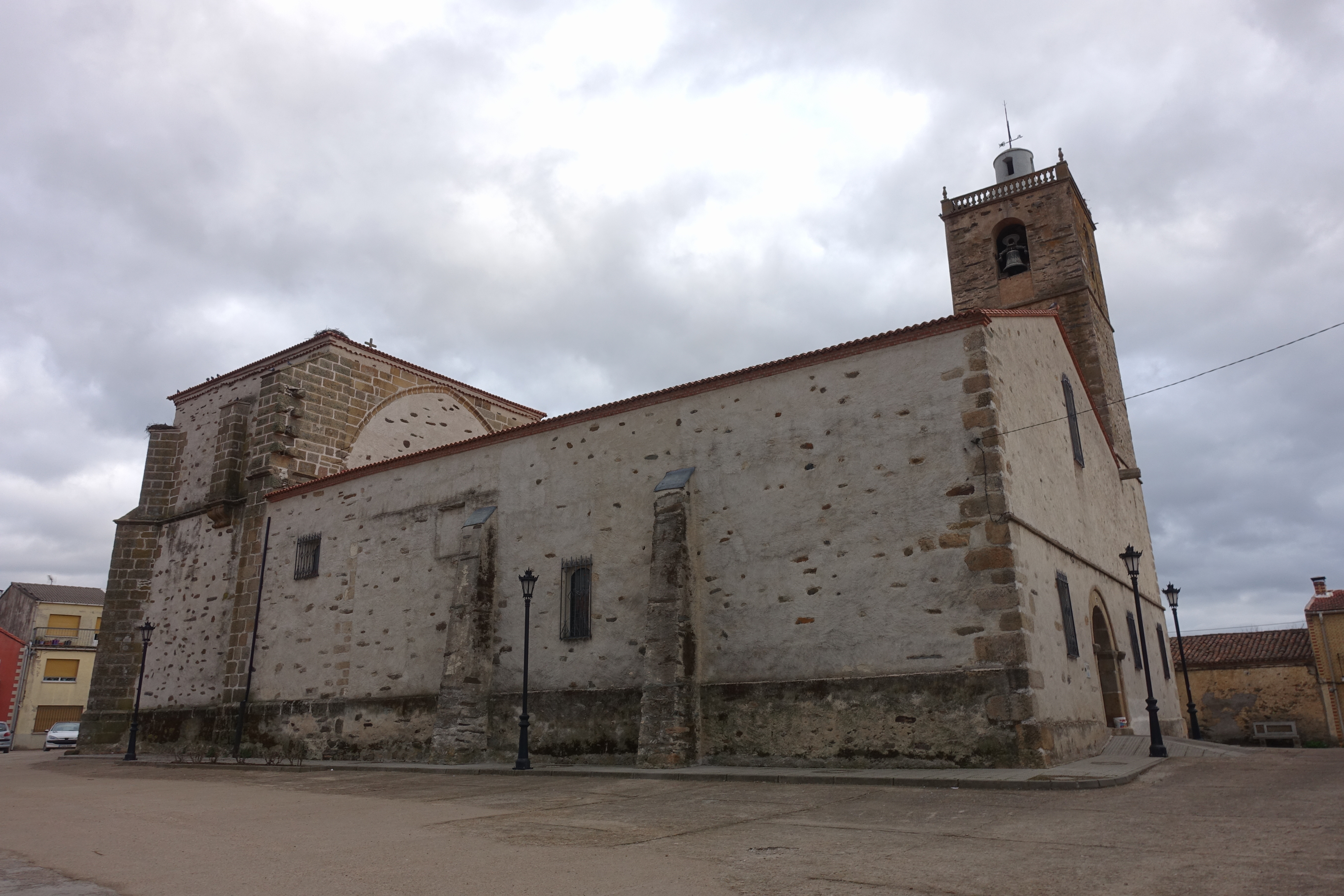 Iglesia de la Asunción, Martiago (Salamanca, España).